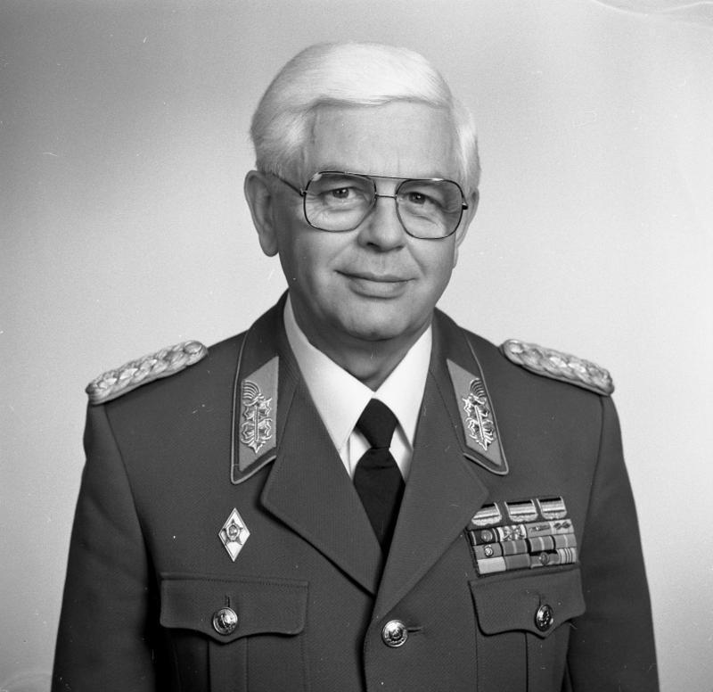 Horst Brünner ADN-ZBSchöps / 18.10.88 / Berlin: Generaloberst Horst Brünner; Mitglied des ZK der SED, Stellverteter des Ministers für Nationale Verteidigung und Chef der Politischen Hauptverwaltung der Nationalen Volksarmee. [Porträt Horst Brünner] Abgebildete Personen: Brünner, Horst: Stellvertretender Verteidigungsminister, Generaloberst, ZK der SED, DDR